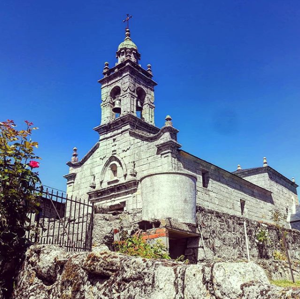 Igresia de Carracedo, en A Veiga